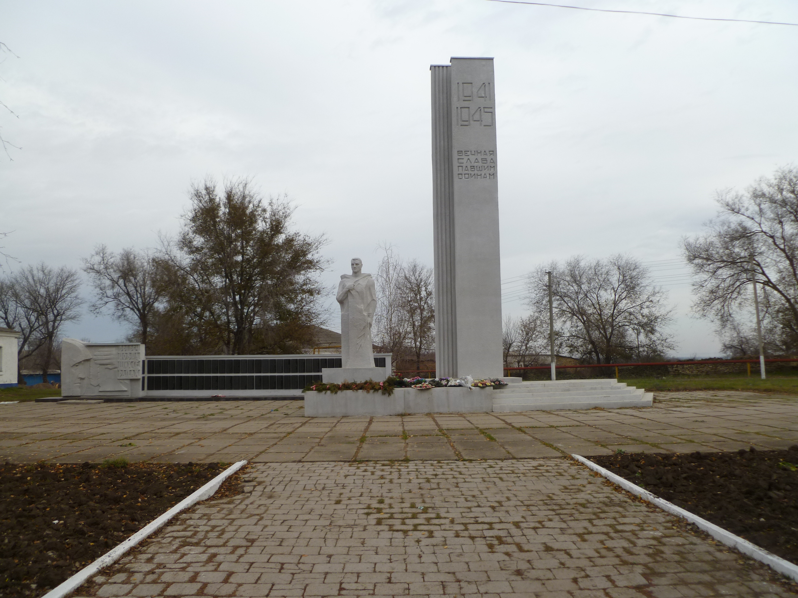 Обелиск павшим жителям села Константиновка